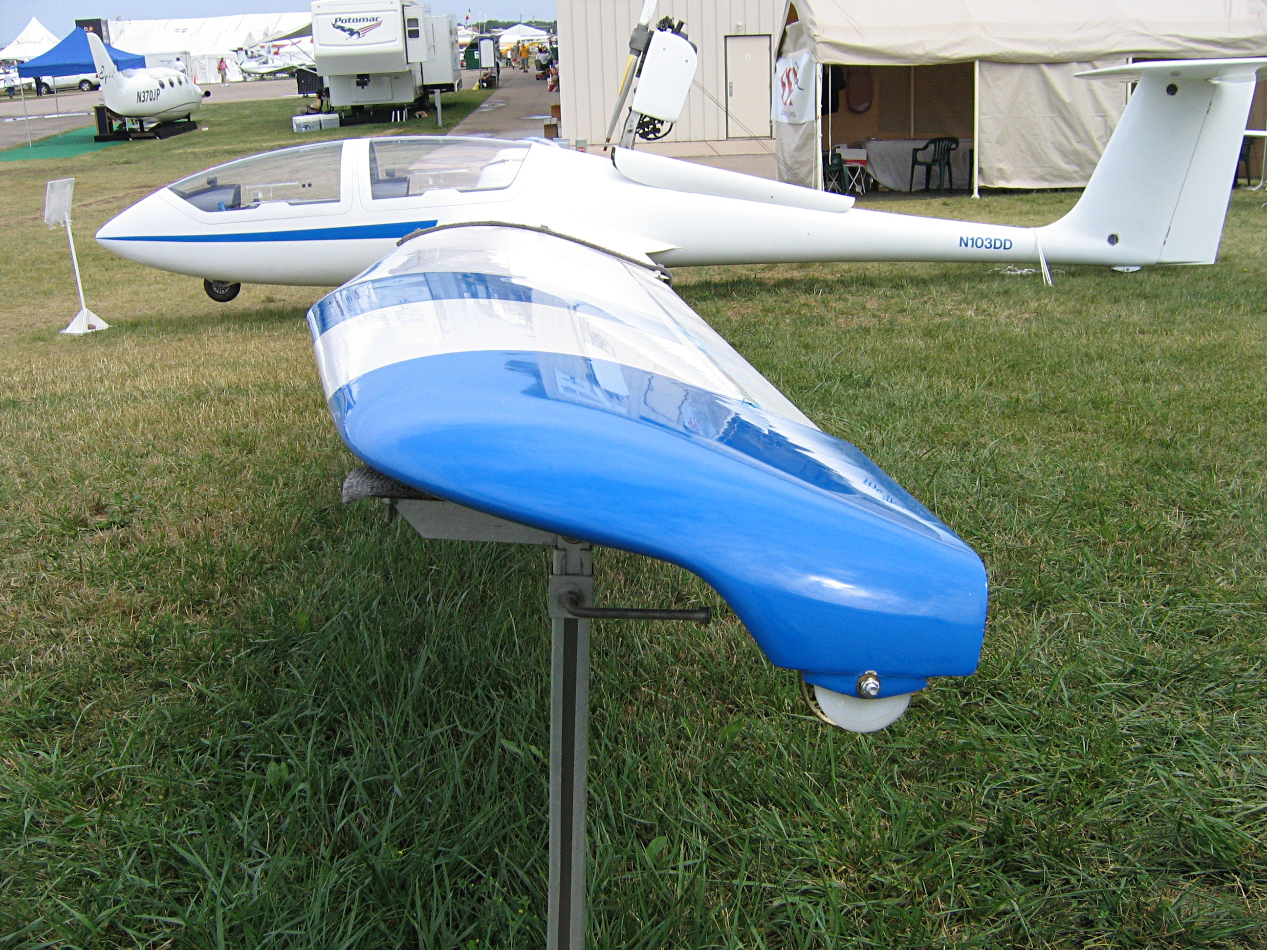 Grob G103C Twin III SL Glider